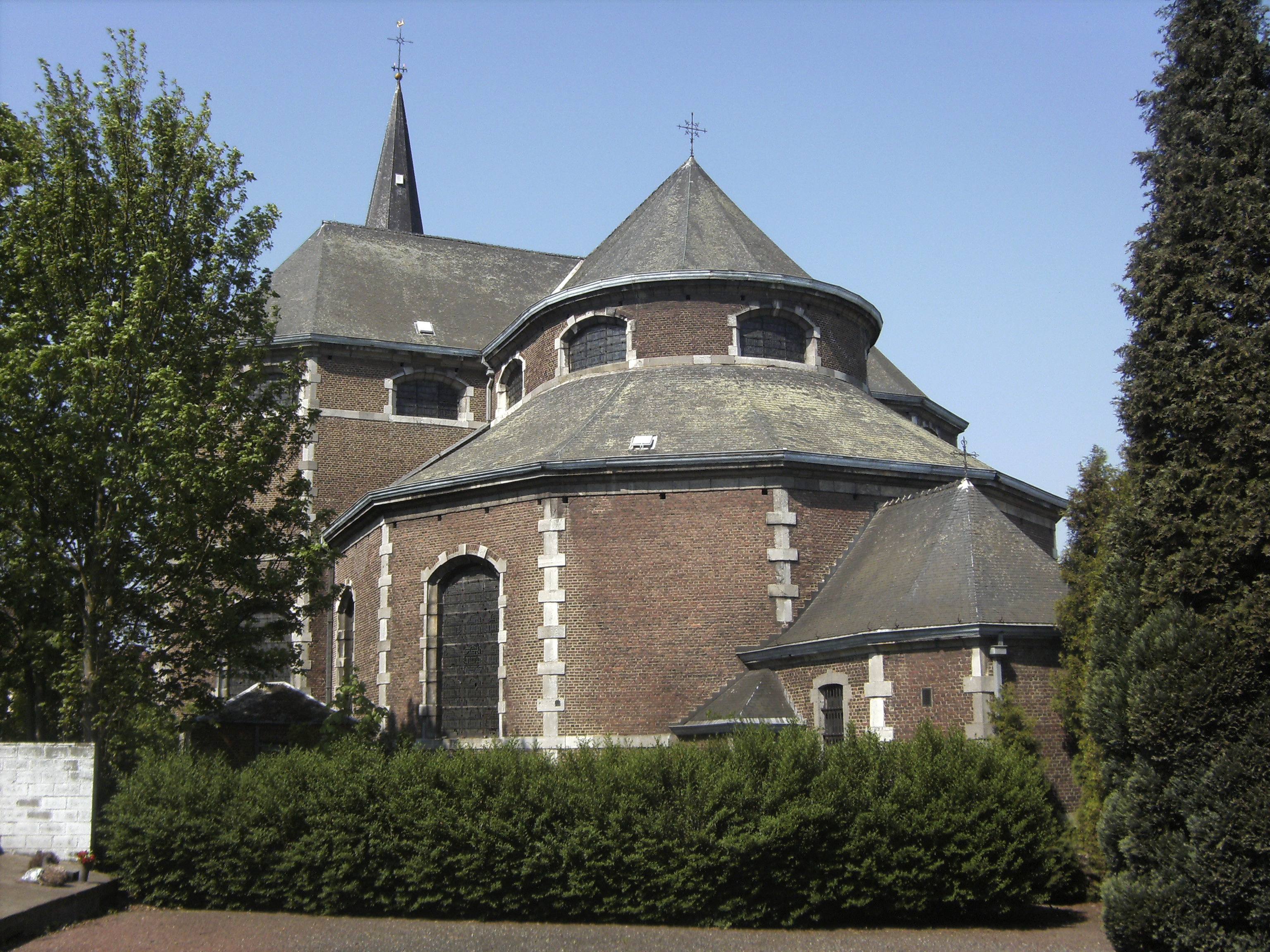 Jumet (Charleroi - Belgique) - Église Saint-Sulpice (1750-1753) - chevet